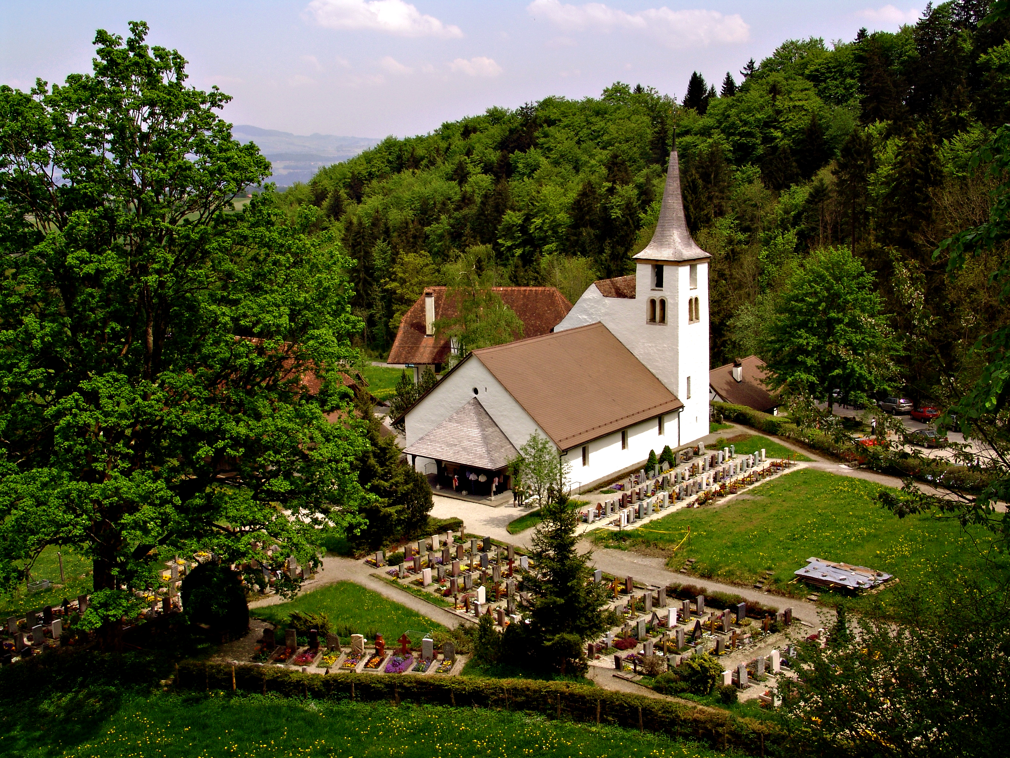 Reformierte Kirche Blumenstein Kt. Bern